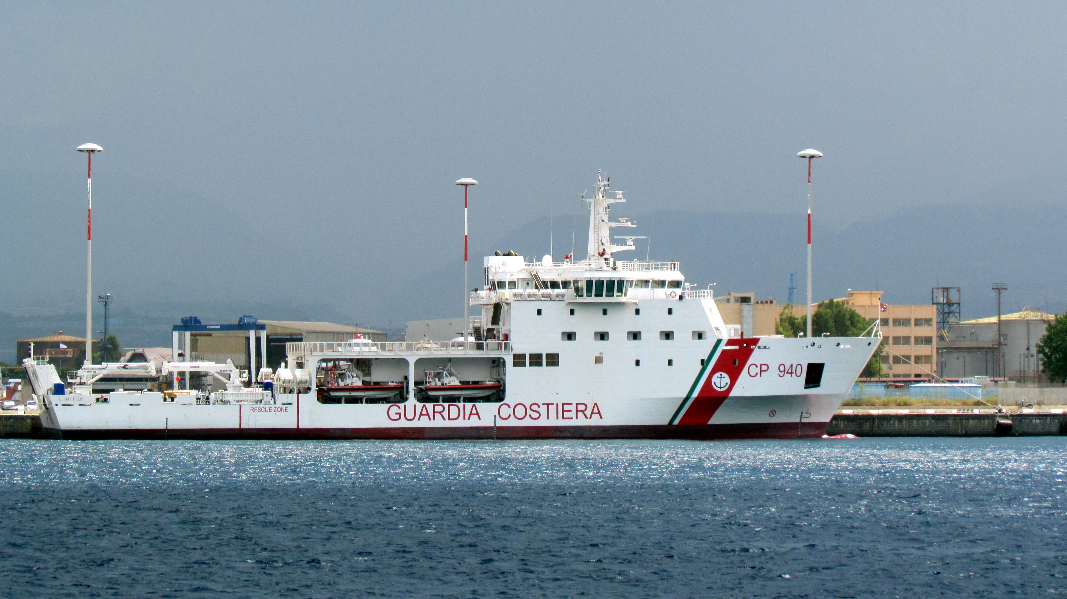 Il pattugliatore della Guardia Costiera Dattilo ormeggiato a Messina